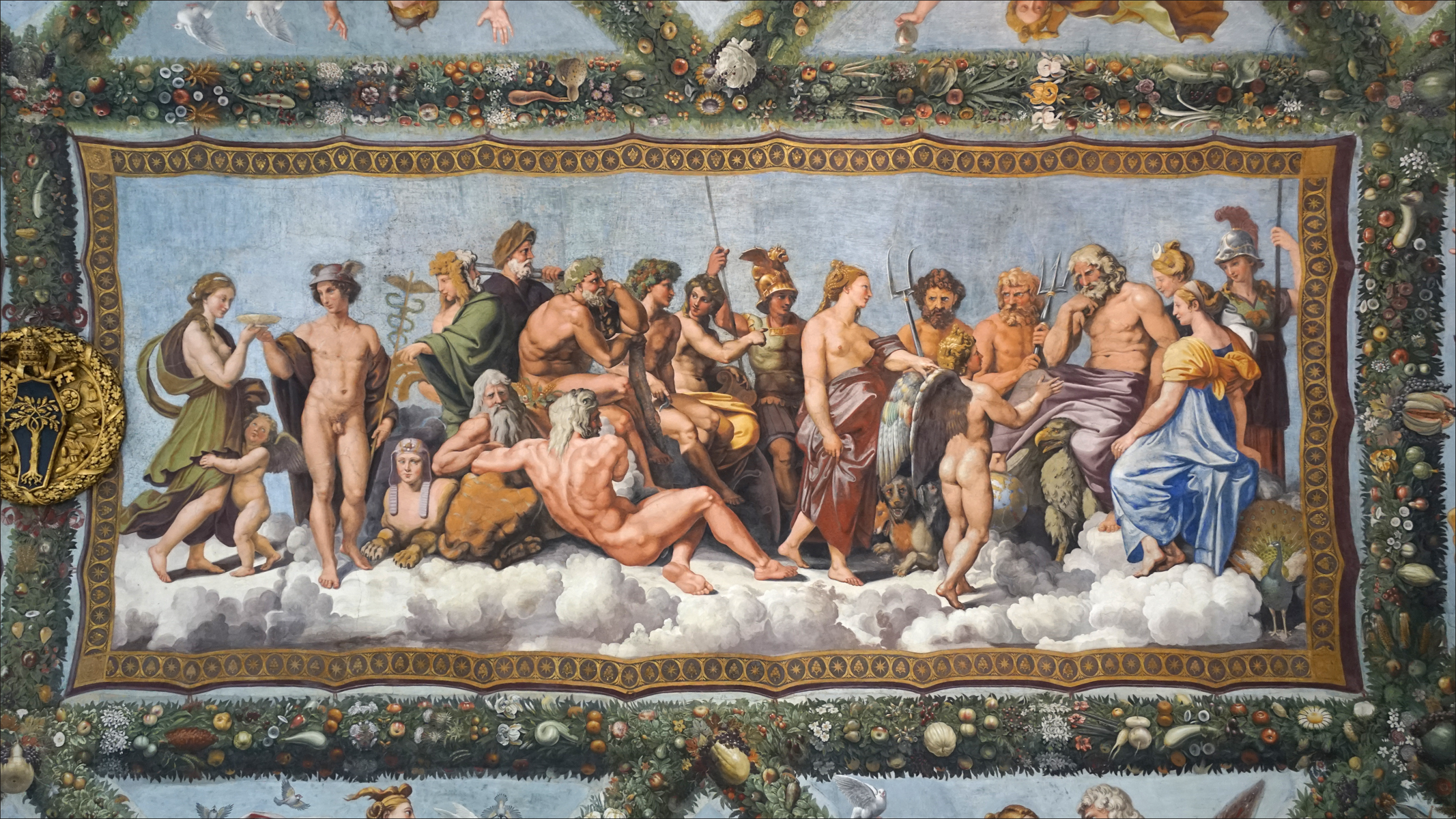 Le concile des Dieux Fresque au plafond de la loggia d'Amour et de Psyché de la villa Farnesina peinte par Raphaël et son atelier Dans la récit, les Dieux se réunissent pour décider s'ils acceptent Psyché parmi eux. Cette loggia était à l'origine la voie d'accès à la villa. C'était un lieu de fête en été. La voûte a été peinte par Raphaël et son atelier en 1518 avec des scènes de la fable d'Amour et Psyché, tirée du récit l'Âne d'Apulée. La Farnesina est une des plus belles villas romaines de la Renaissance. La fusion entre l'architecture et la décoration picturale y est particulièrement réussie. Site officiel de la Farnesina